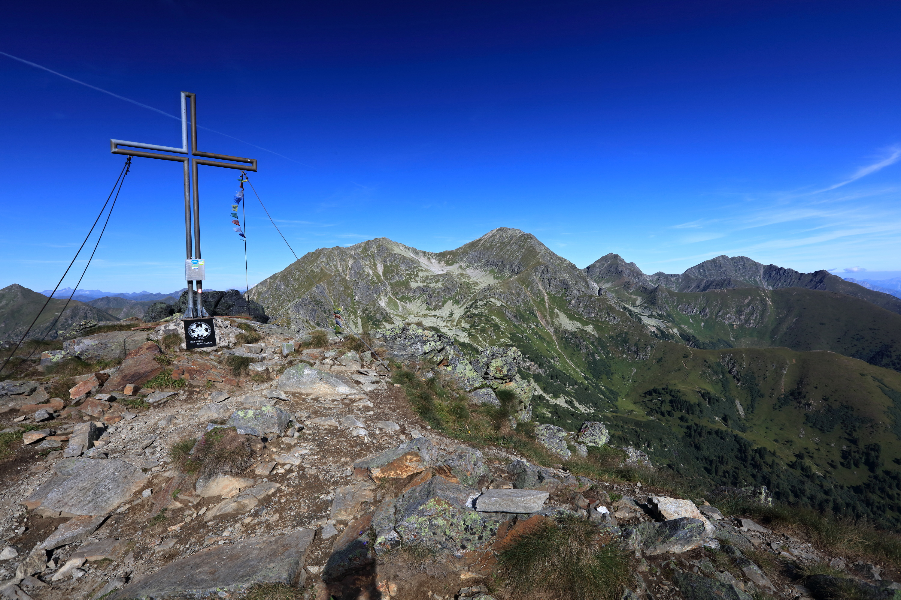 Gemeinde Hohentauern, 8785, Austria. Gipfelkreuz Großer Hengst (2159m) zurück zu Kleiner und Großer Bösenstein.